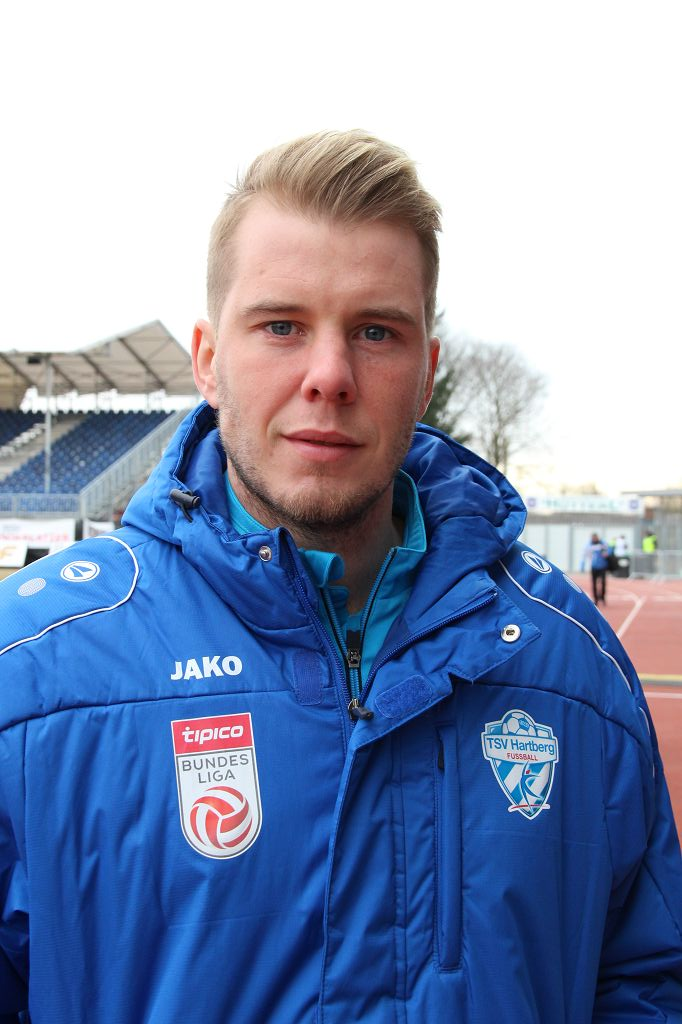 Rene Swete (Hartberg)